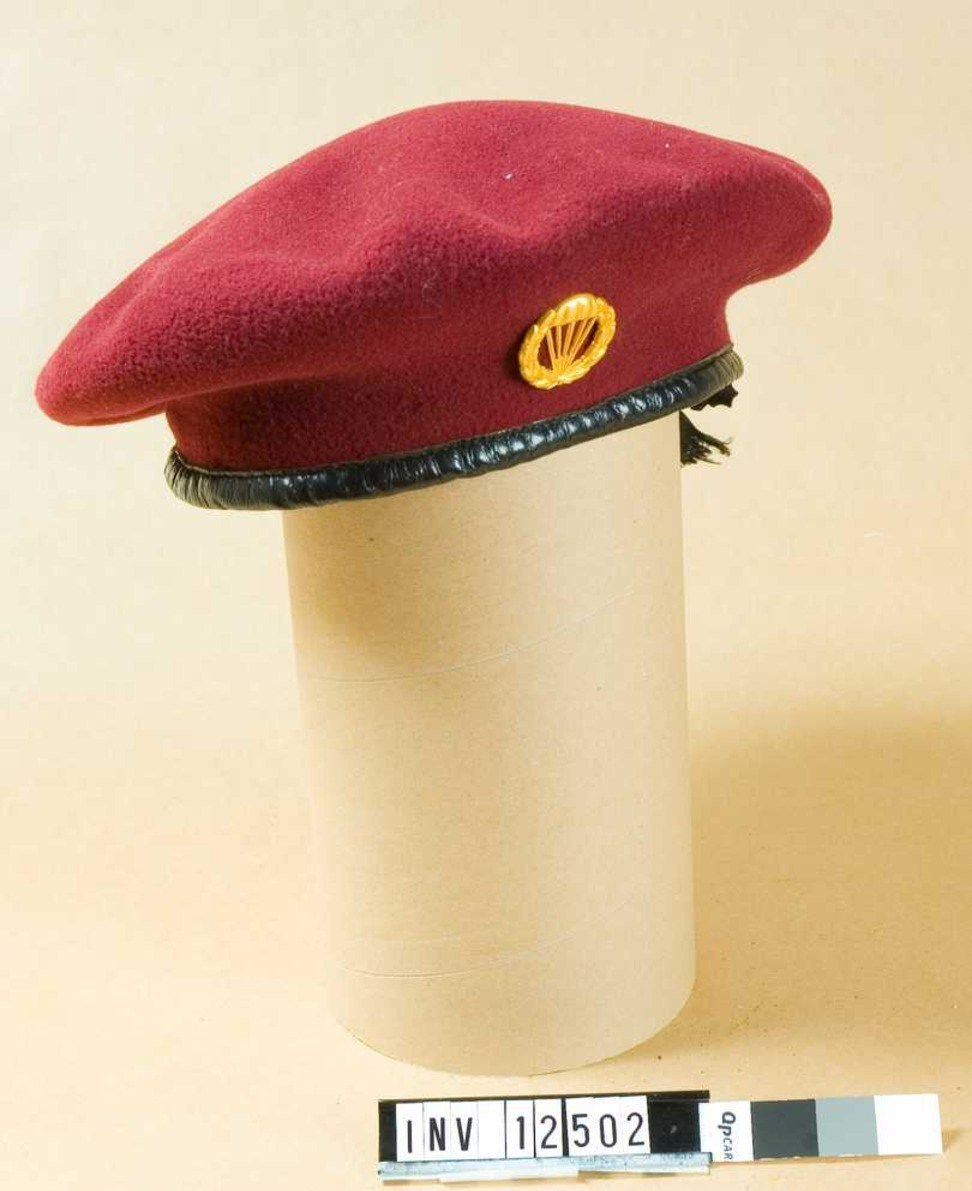 Baskermössa m/1952 för fallskärmsjägare Identifikationsnr: AM.012502 Samling: Armémuseum